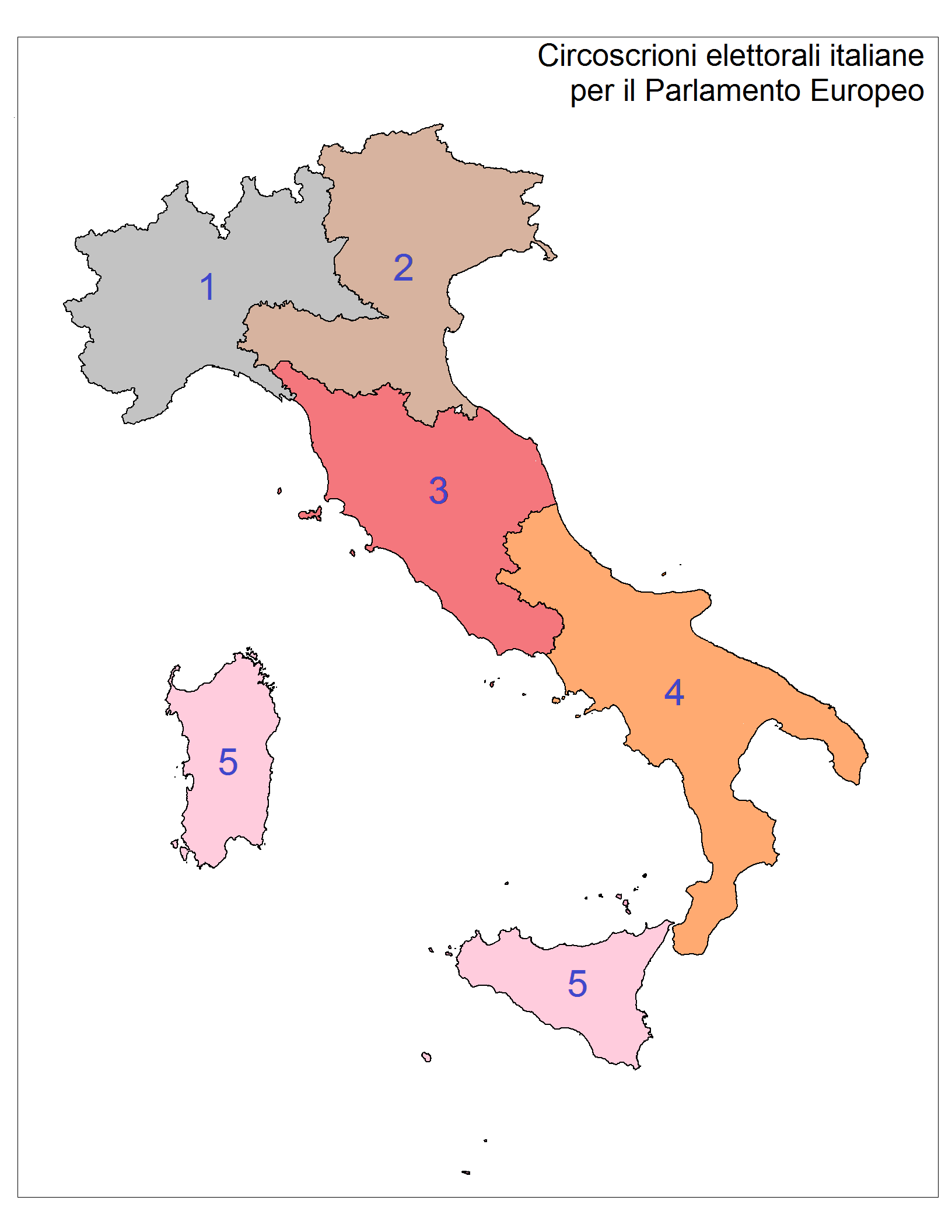 Mappa delle circoscrizioni elettorali italiane in vigore per le elezioni del parlamento europeo